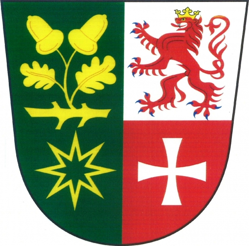 znak,Zdobín , okres Trutnov